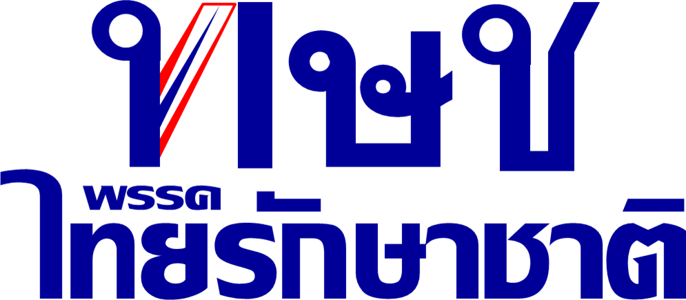 ตราสัญลักษณ์พรรคไทยรักษาชาติ (7 พฤศจิกายน 2561-ปัจจุบัน)